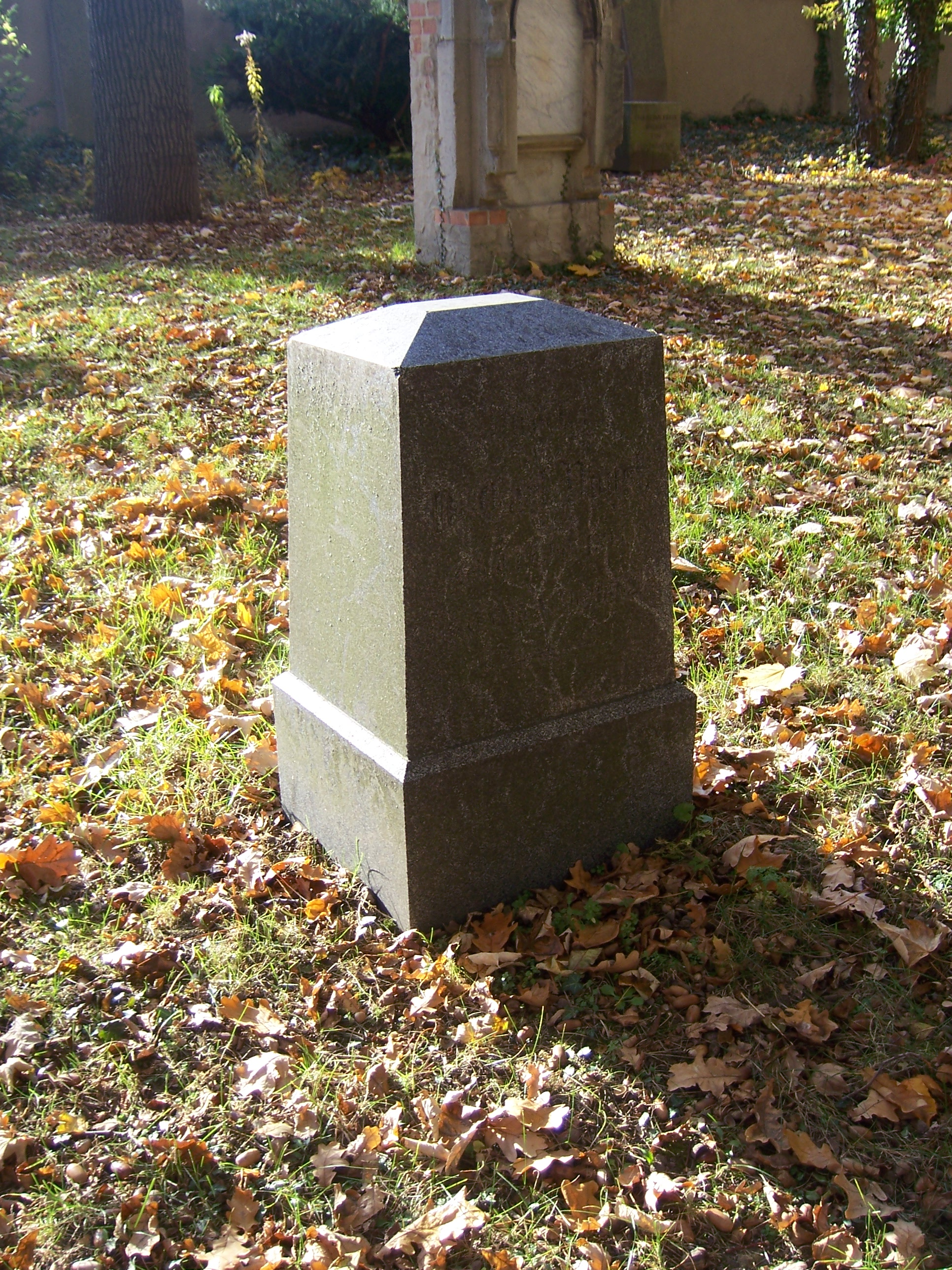 Grabstein Johann Karl Christoph Vogel, ursprünglich: Neuer Johannisfriedhof